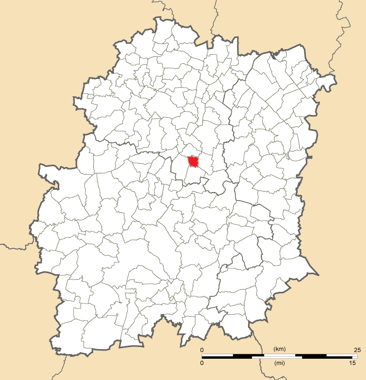 Carte de position de Guibeville en Essonne (91)